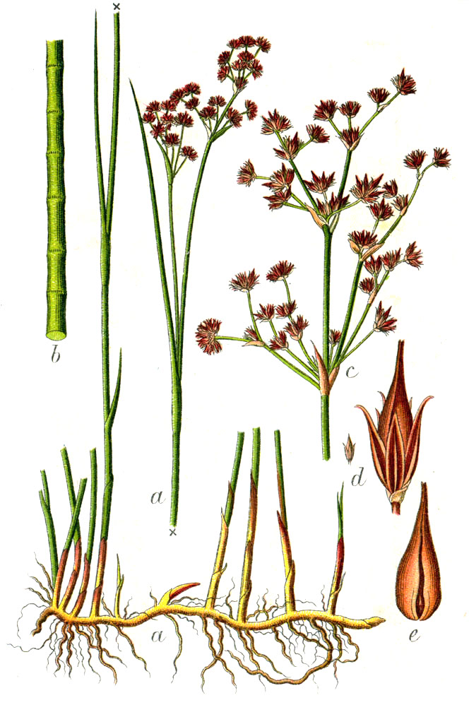 Juncus acutiflorus Ehrh. ex Hoffm. Original Caption Spitzblumige Knotenbinse, Juncus acutiflorus